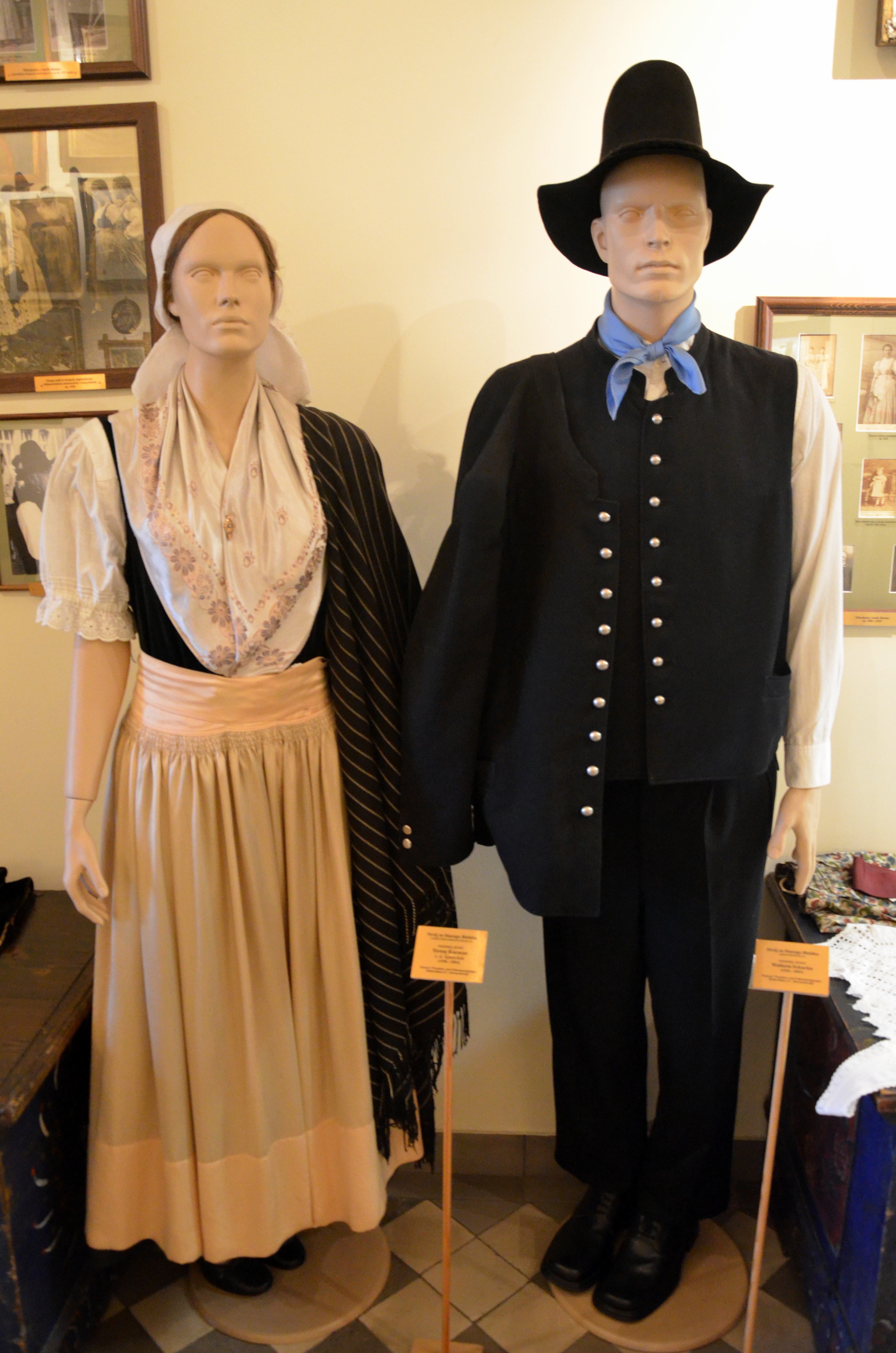 Bielitz-Bialaer Sprachinsel